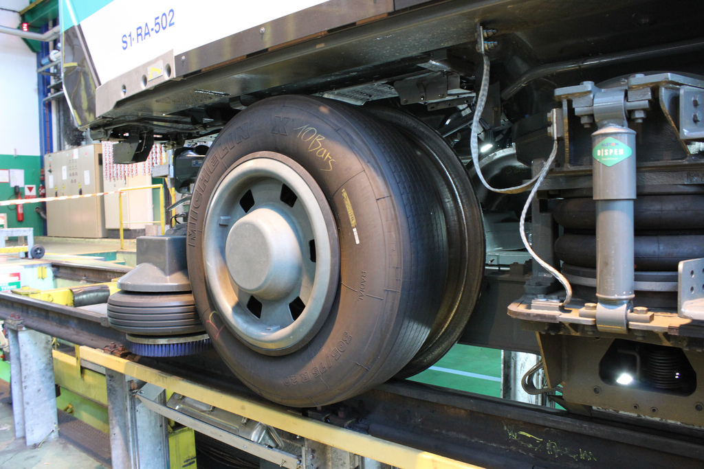 Bogie avant d'un train MP 05 aux ateliers de Fontenay